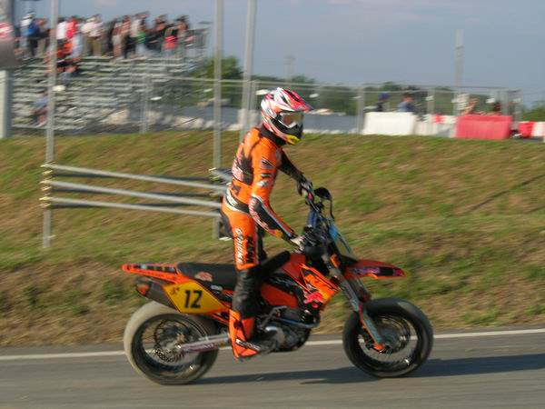 Bernd Hiemer beim GP Europa 2006 in Casteletto di Branduzzo (PV)